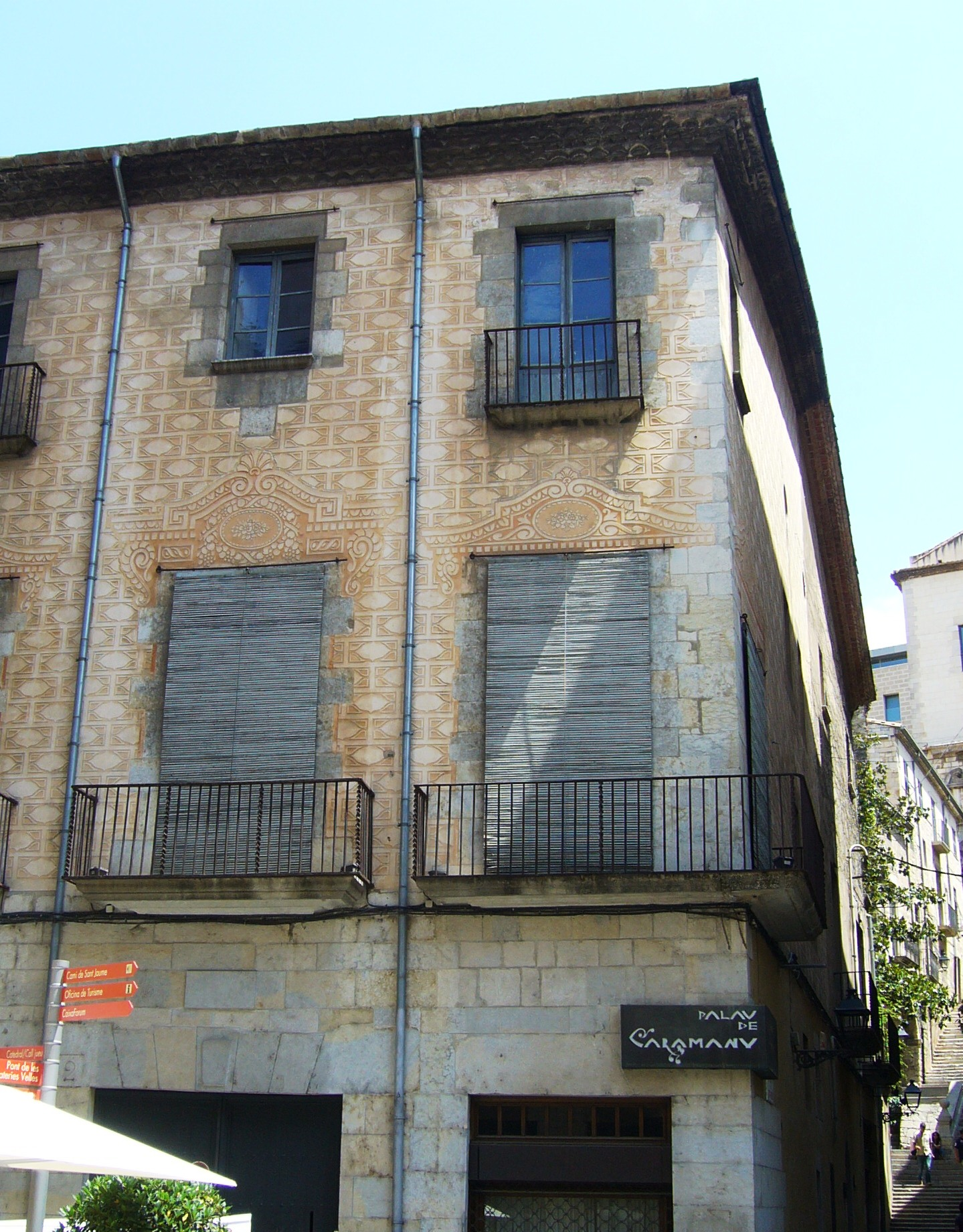 Restauració i reforma d'un casal del segle XVIII.